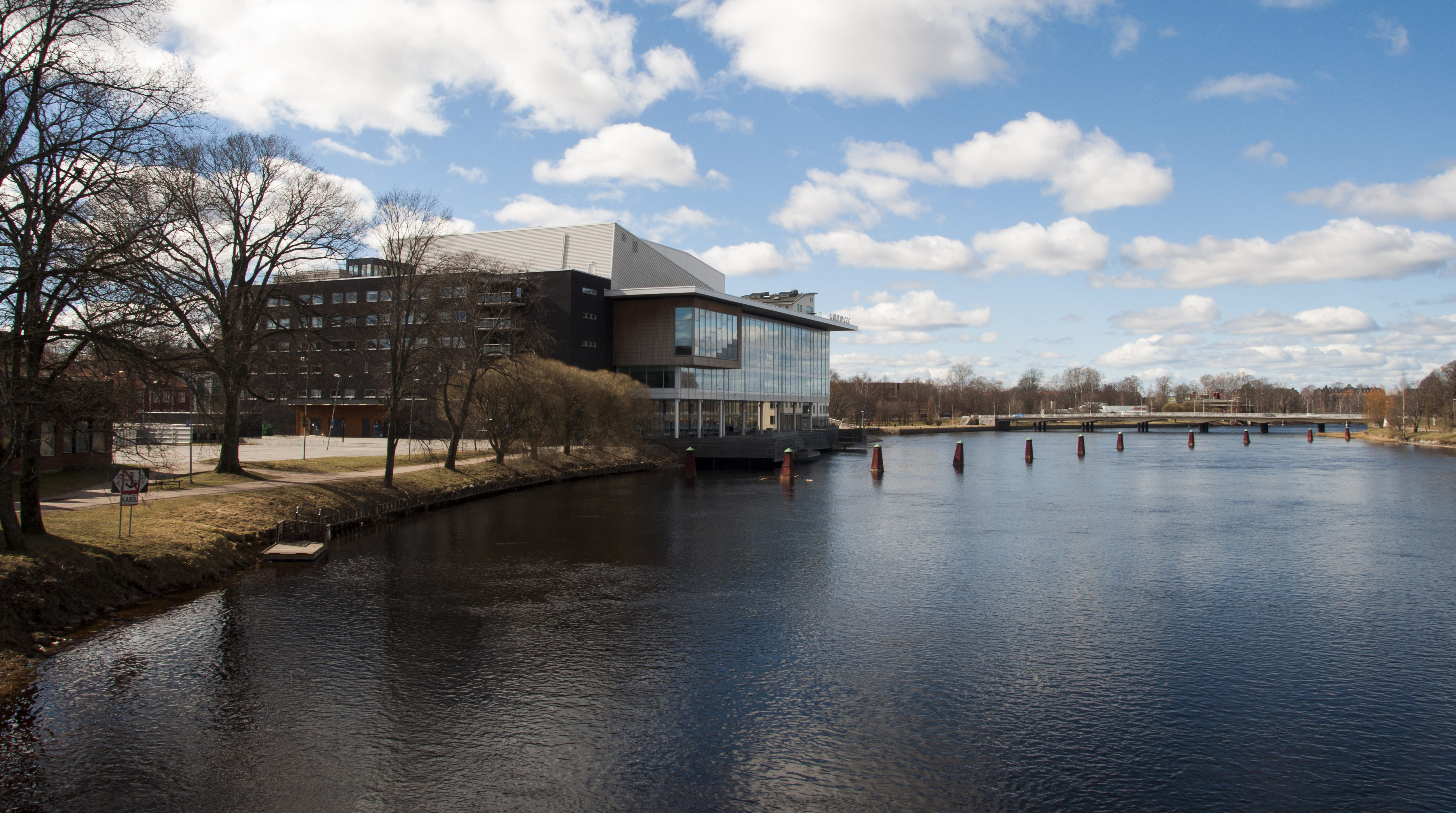 Karlstad CCC, Byggnadsår 2011. Arkitekt: Ulf Bergfjord